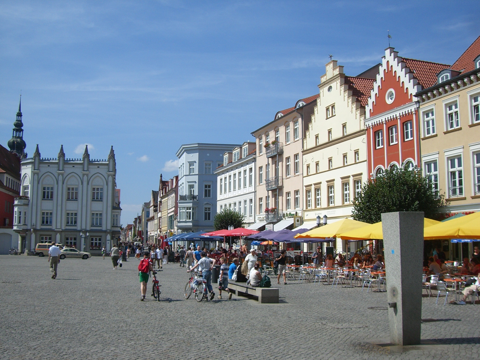 Marktplatz Greifswald